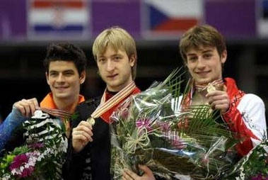 Чемпионат Европы по фигурному катанию на коньках 2006 года. Пьедестал в мужском одиночном катании